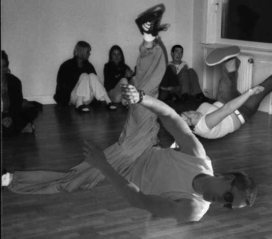 Breakdancing Kurt